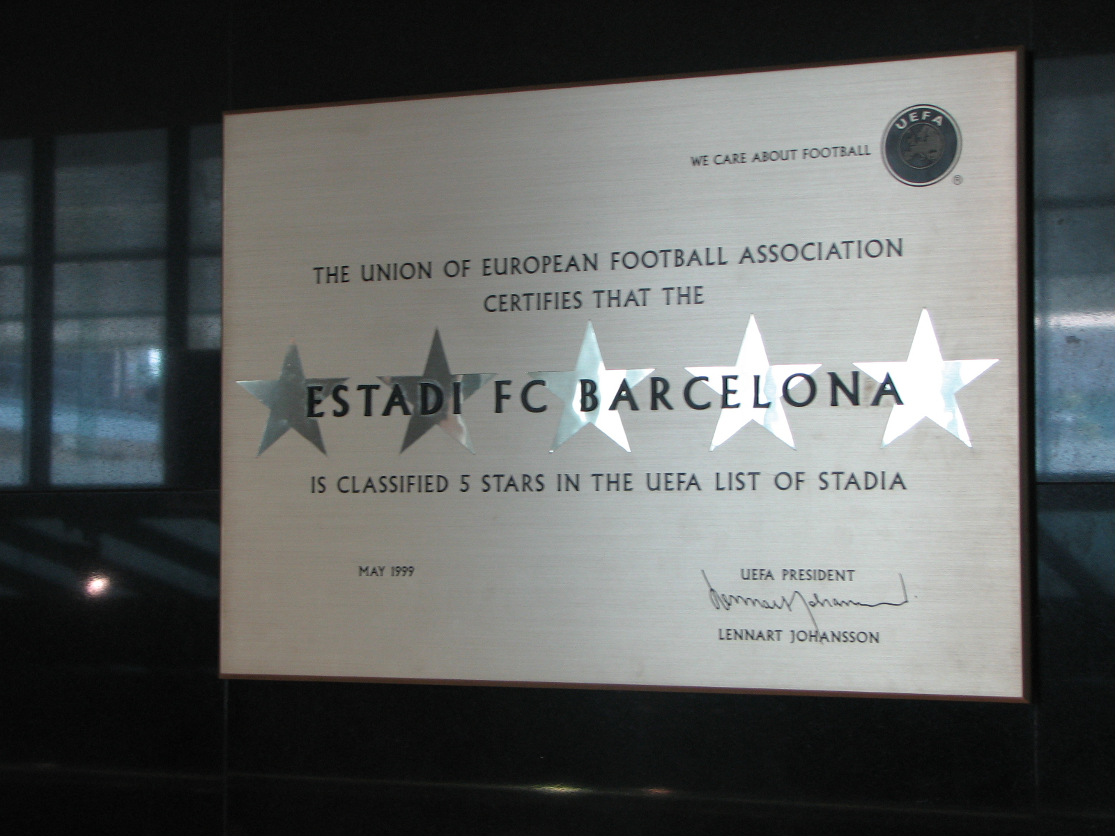 Barcelona